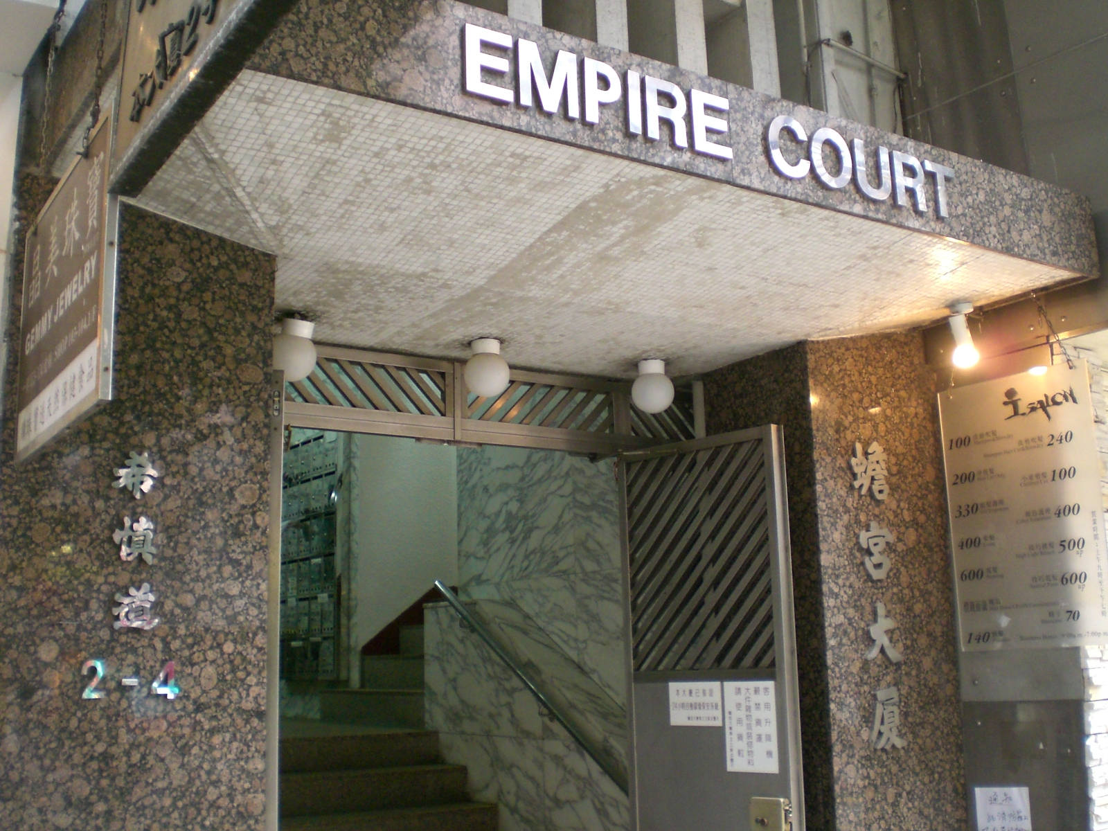 蟾宮大廈, 利園山道, 希慎道, 銅鑼灣. Author= Kwanyatsw